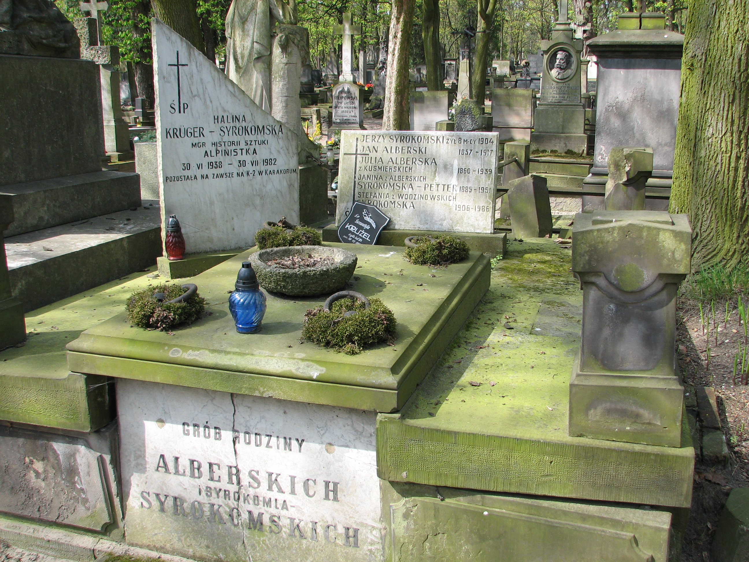 Halina Krüger-Syrokomska grób symboliczny - Warszawa, Cmentarz Powązkowski